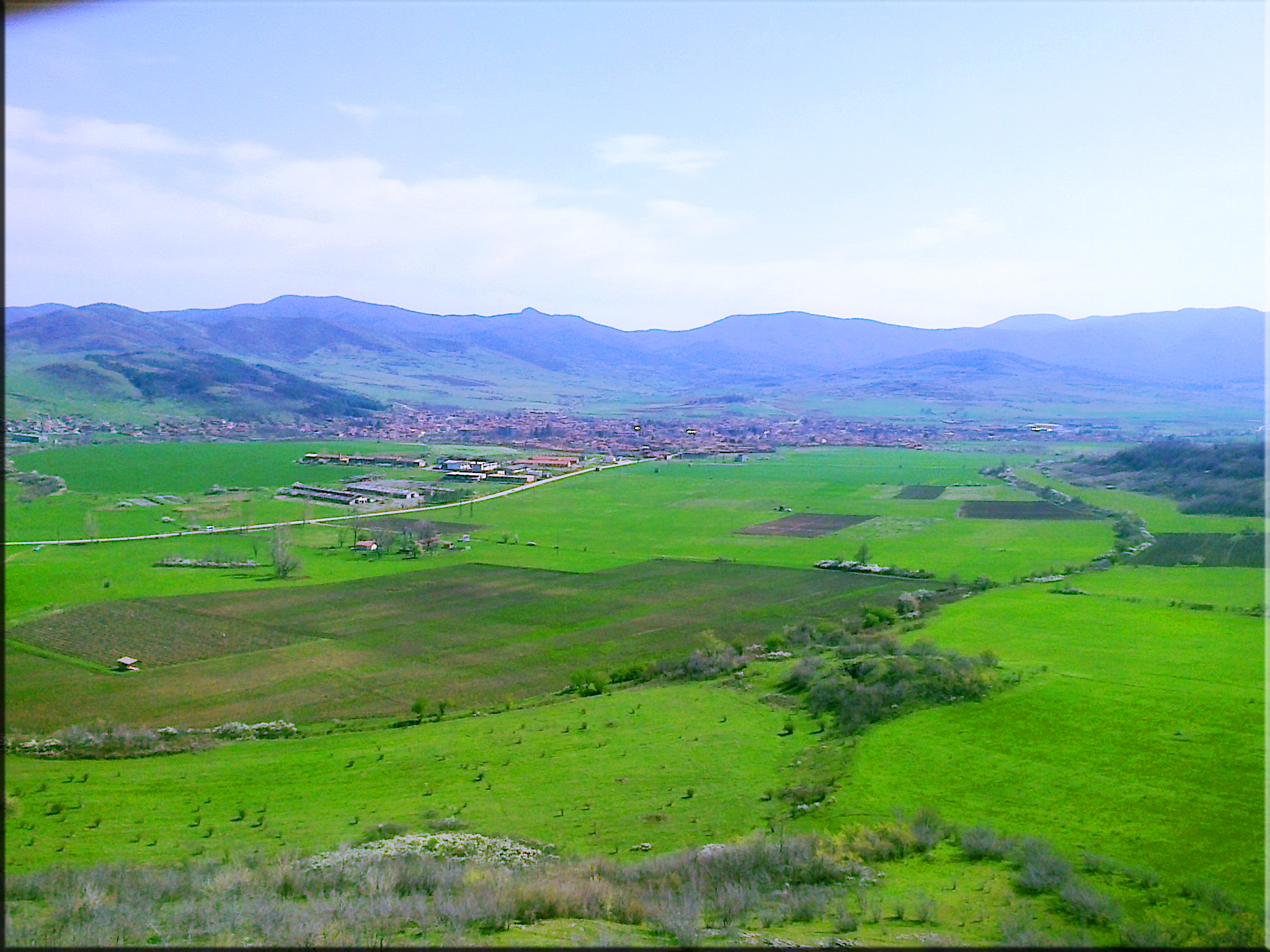 с.Искра